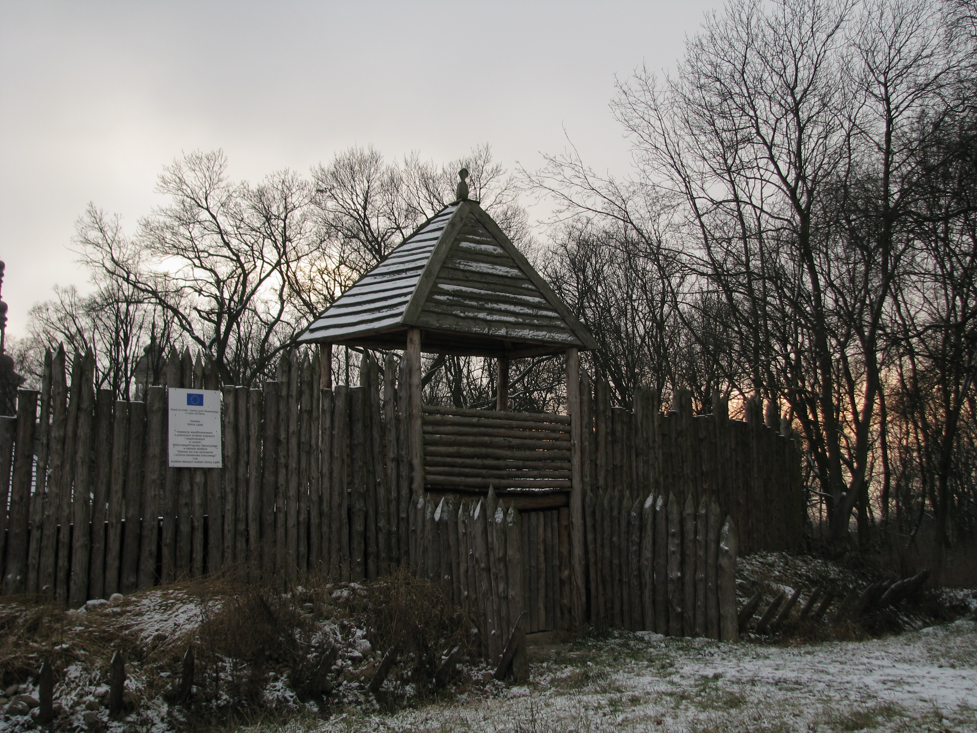 Rekonstrukcja grodu dawnych Słowian w Lądzie, gmina lądek, powiat słupecki